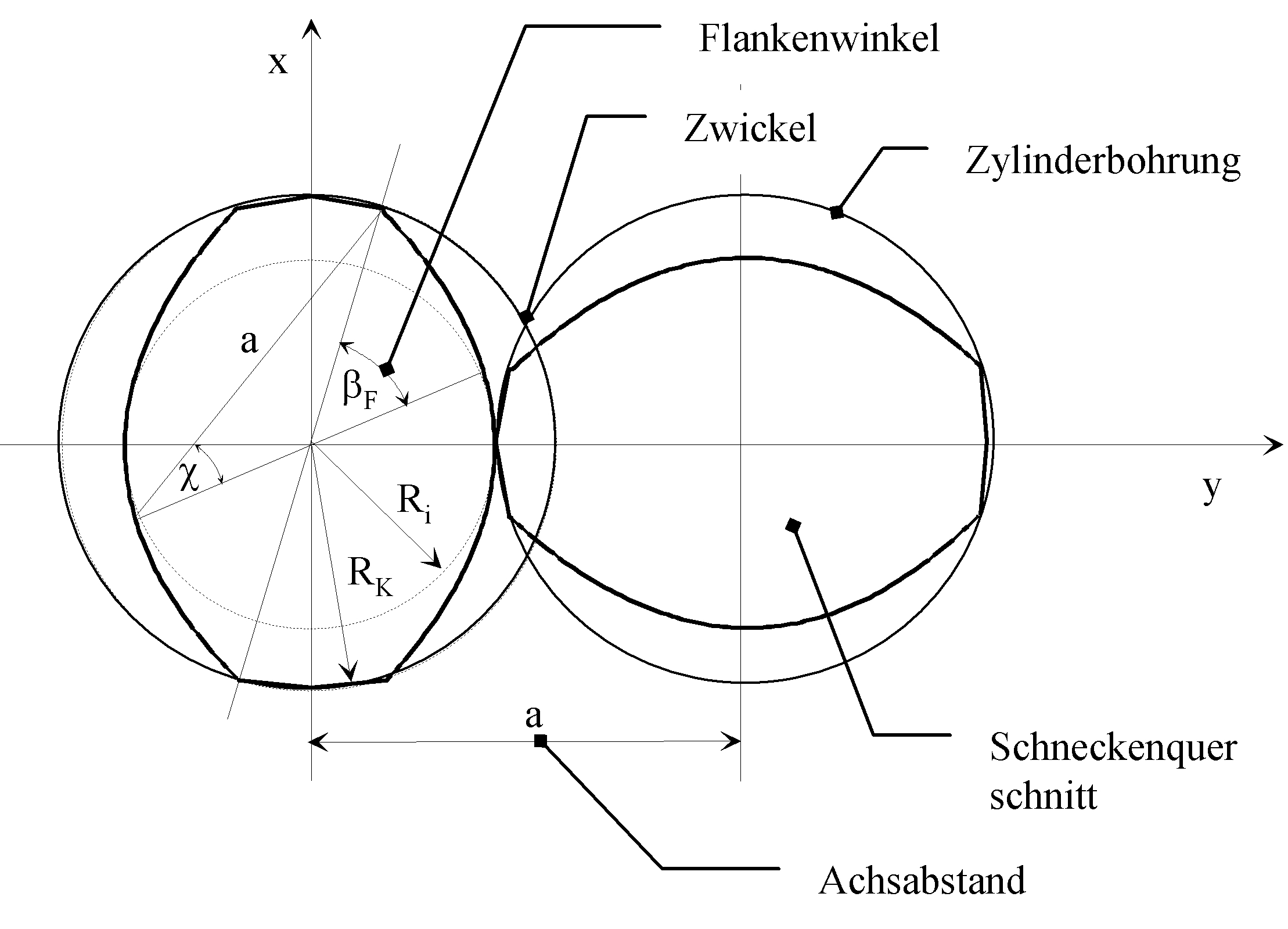 Extruder Doppelschnecke Geometrie